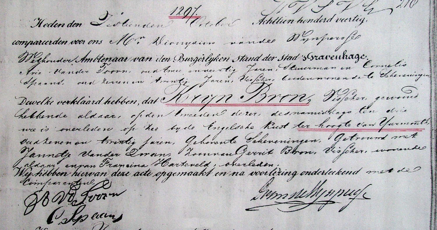 Overlijdensakte van een slachtoffer van de scheepsramp met de Scheveningse vissersboot De Vrouw Pieternella Pronk op 1 en 2 oktober 1840 op de Noordzee ten noorden van Yarmouth.